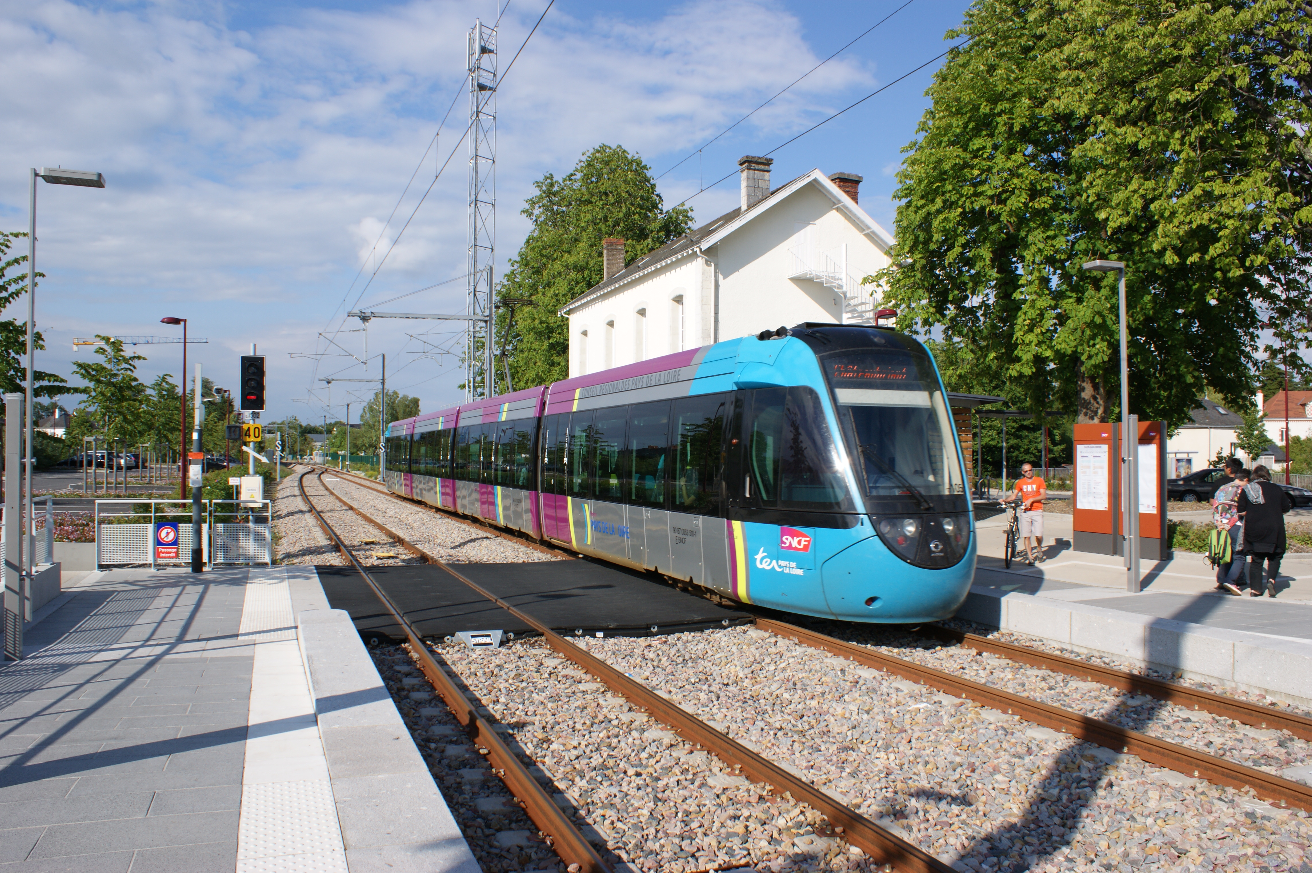 Gare de Sucé-sur-Erdre, le tram train n°105 pour Châteaubriant part de la gare.